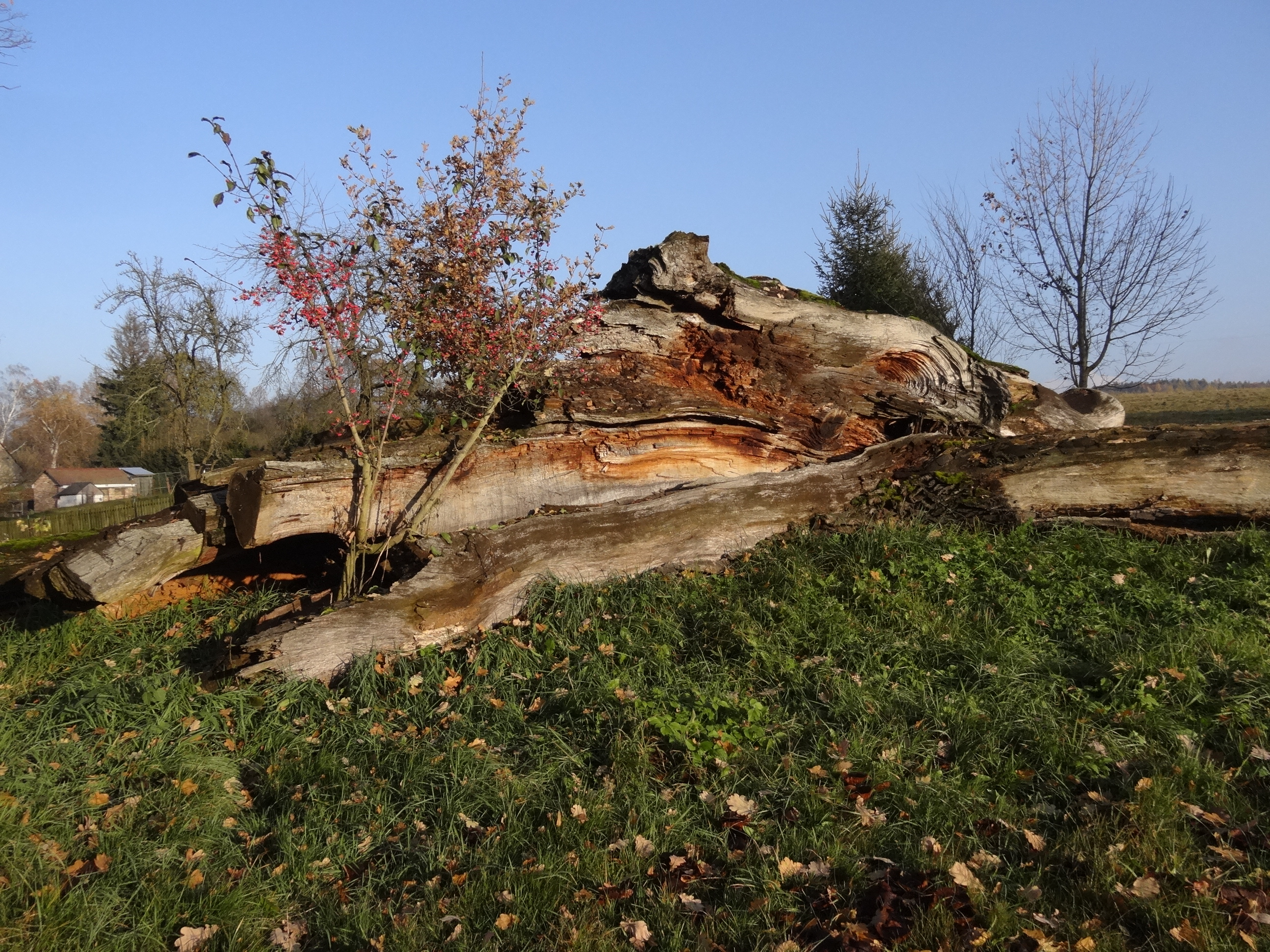 Předlánce - torzo památného dubu letního zvaného Předlánecký obr